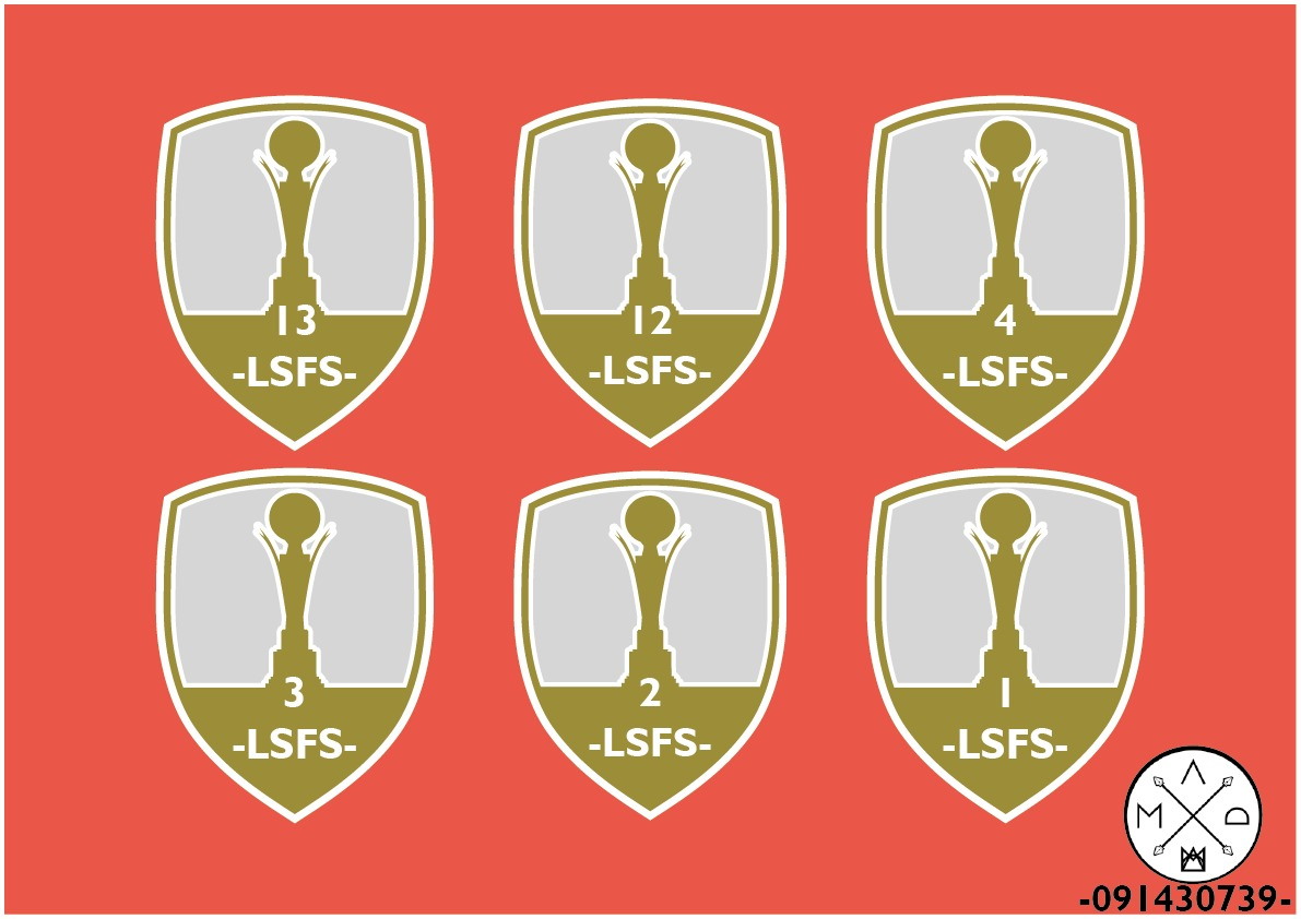 insignias de campeon